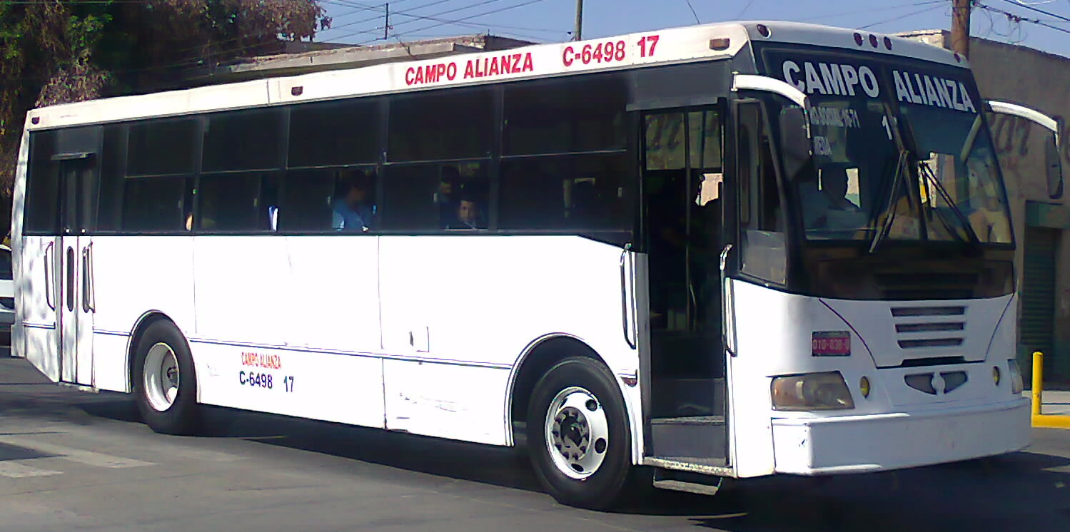 Autobús Campo-Alianza, número económico 19, carrocería AmherBus™